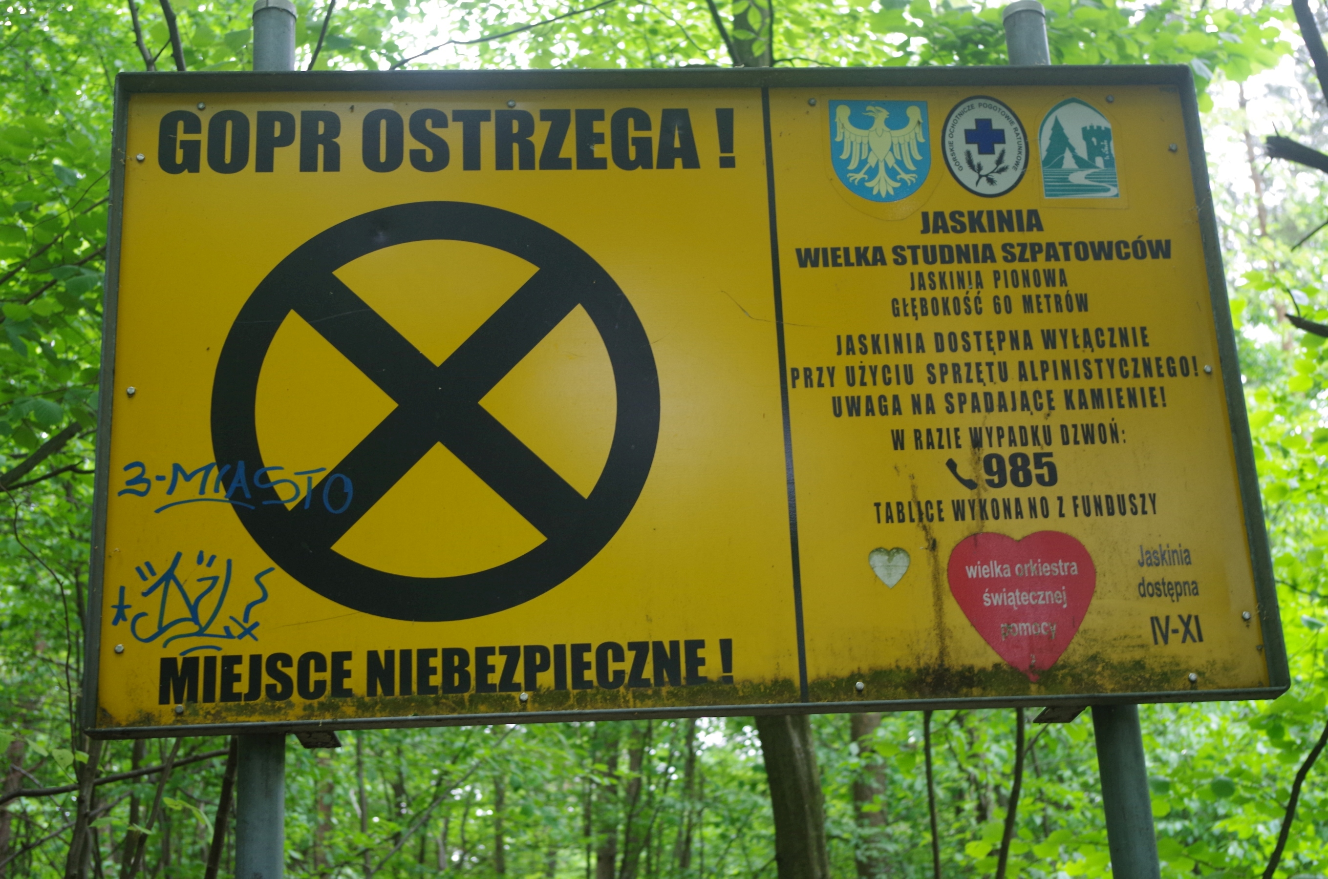 Tablica ostrzegawcza GOPR przed wlotem do jaskini Wielka Studnia Szpatowców w skałach Dudnik w Podlesicach